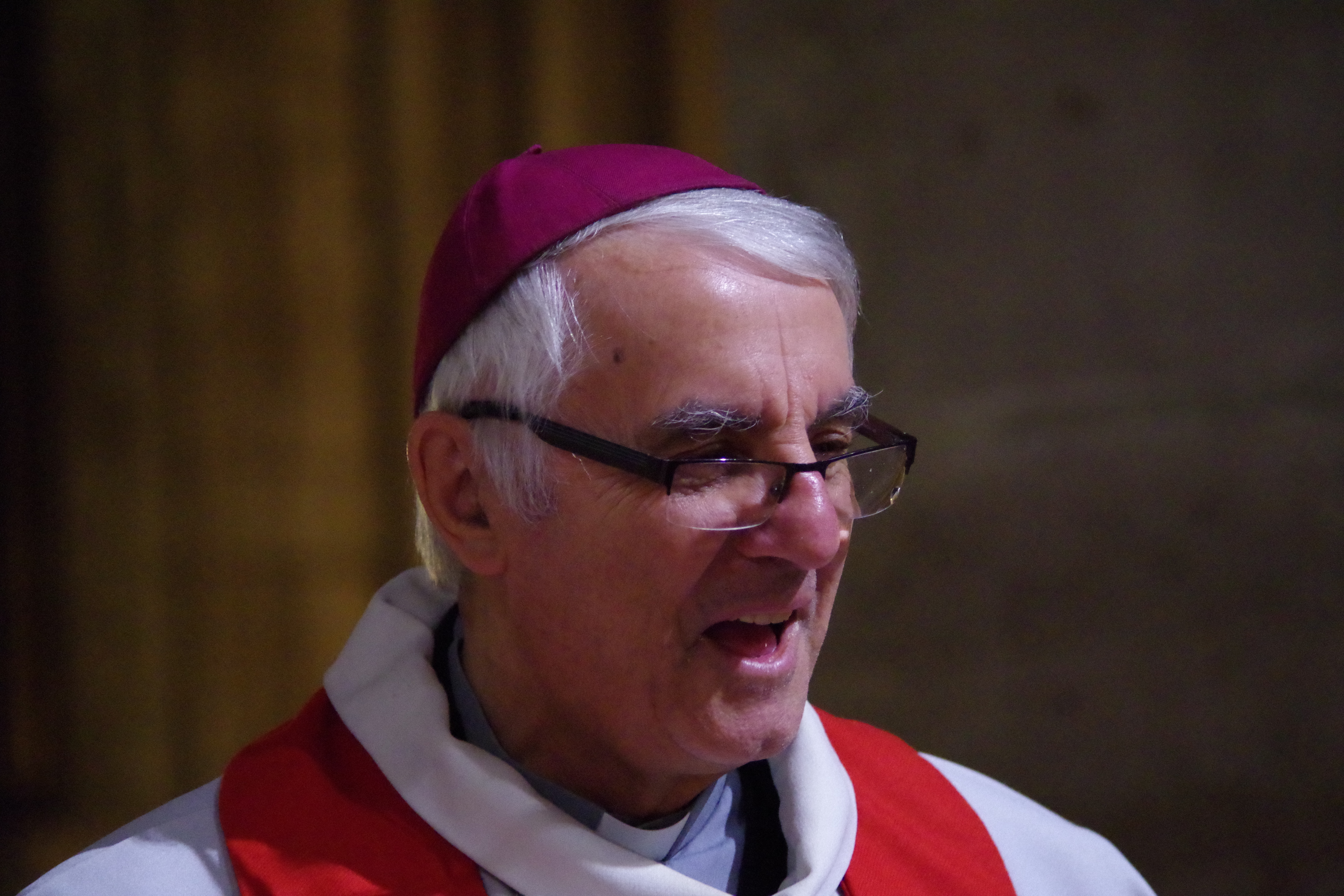 Mgr Santier à la veillée pour la vie en mai 2015 en la cathédrale Notre-Dame-de-Paris